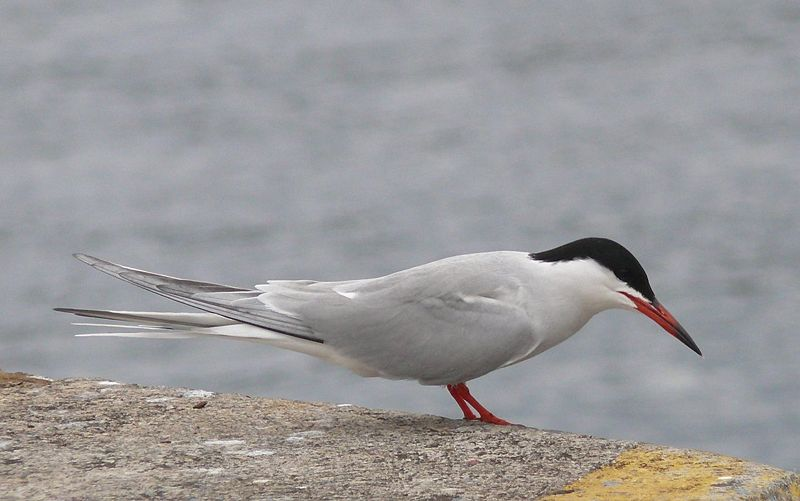 Individuo adulto di sterna comune fotografato sulla marina di Horta, Faial, isole Azzorre